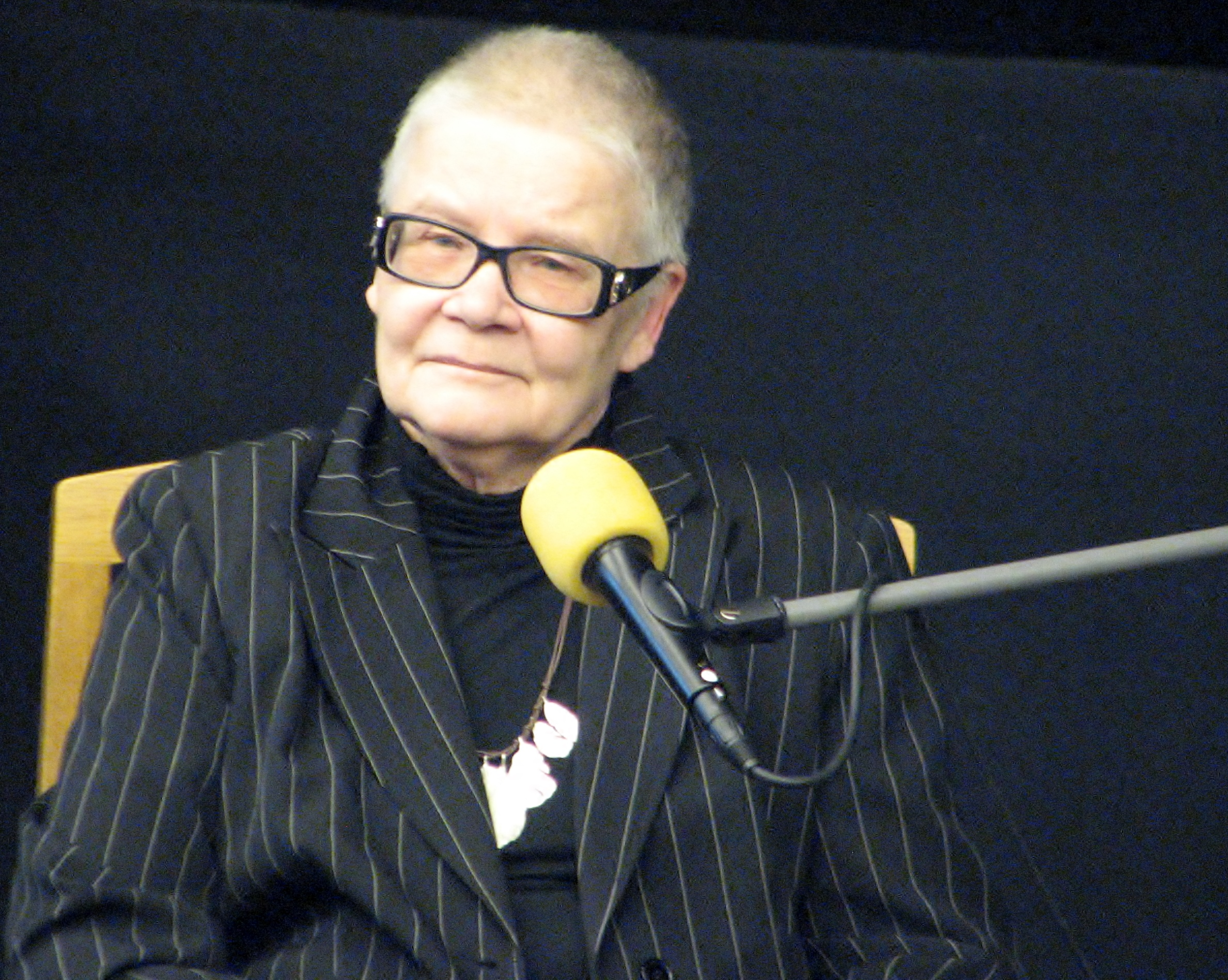 keel" Eesti Draamateatri maalisaalis